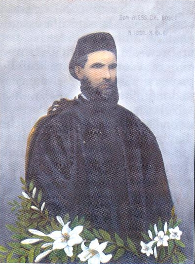 Don Alessandro Dal Bosco